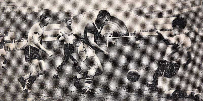 Final da Torneio Cidade de São Paulo, disputada entre Palestra Itália e Corinthians em 1940. Foi o primeiro título ganho no Estádio do Pacaembu e teve o Palestra como campeão.